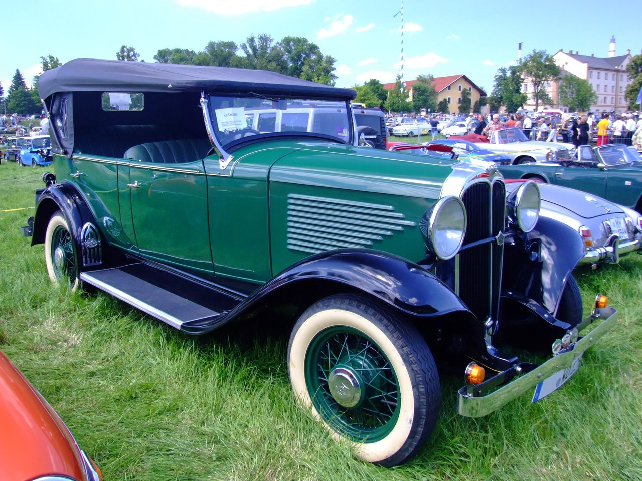 Quelle: selbst fotografiert, 06/2007 Fotograf: Späth Chr.